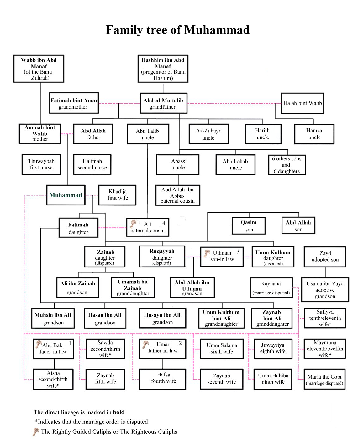 Arbre généalogique de la famille de Muhammad